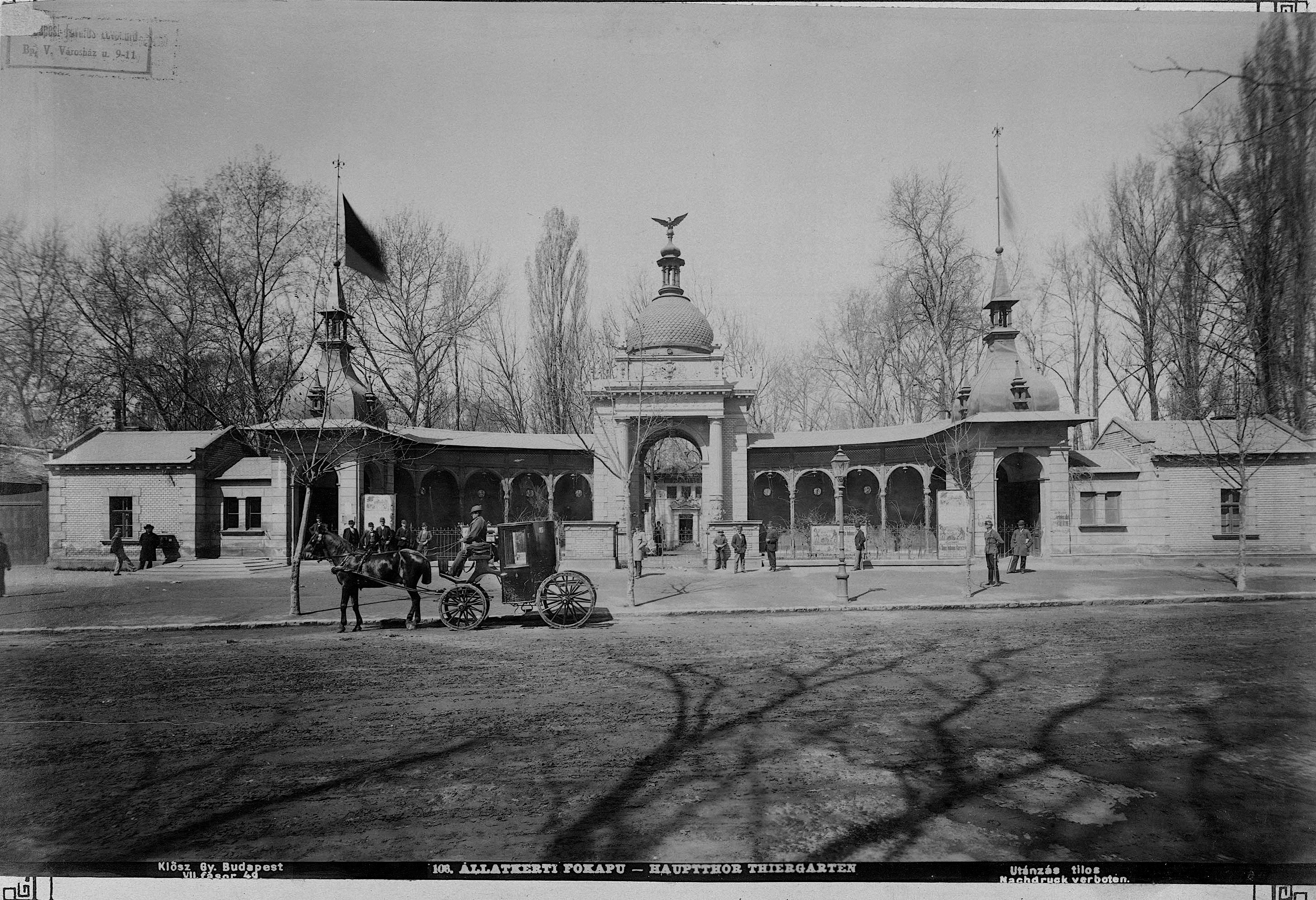 "Állatkert régi főkapuja. A felvétel 1890 után készült." A kép forrását kérjük így adja meg: Fortepan / Budapest Főváros Levéltára. Levéltári jelzet: HU.BFL.XV.19.d.1.07.107 Location: Hungary, Budapest XIV. Tags: Budapest Title: \